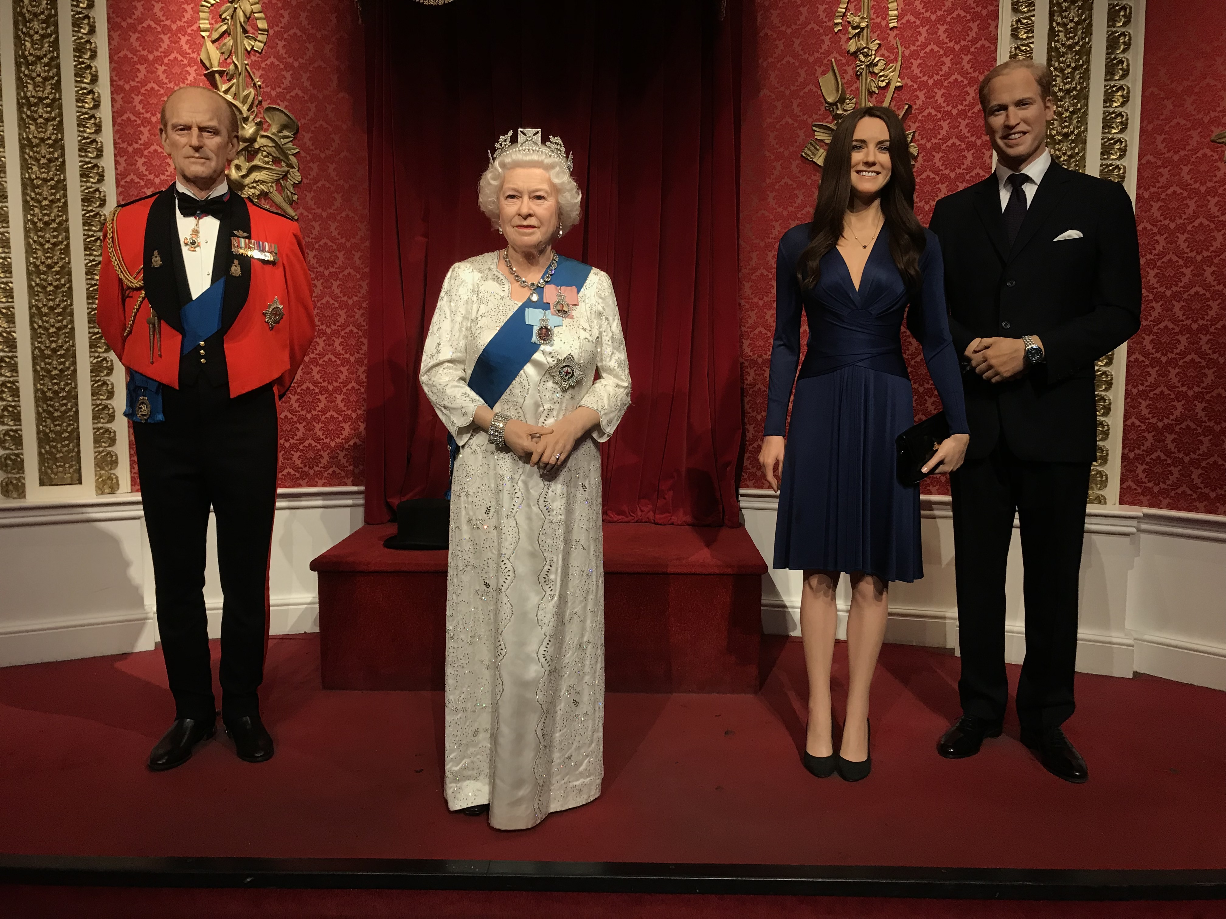 British Royal Family at Madame Tussauds London, July 17, 2019.